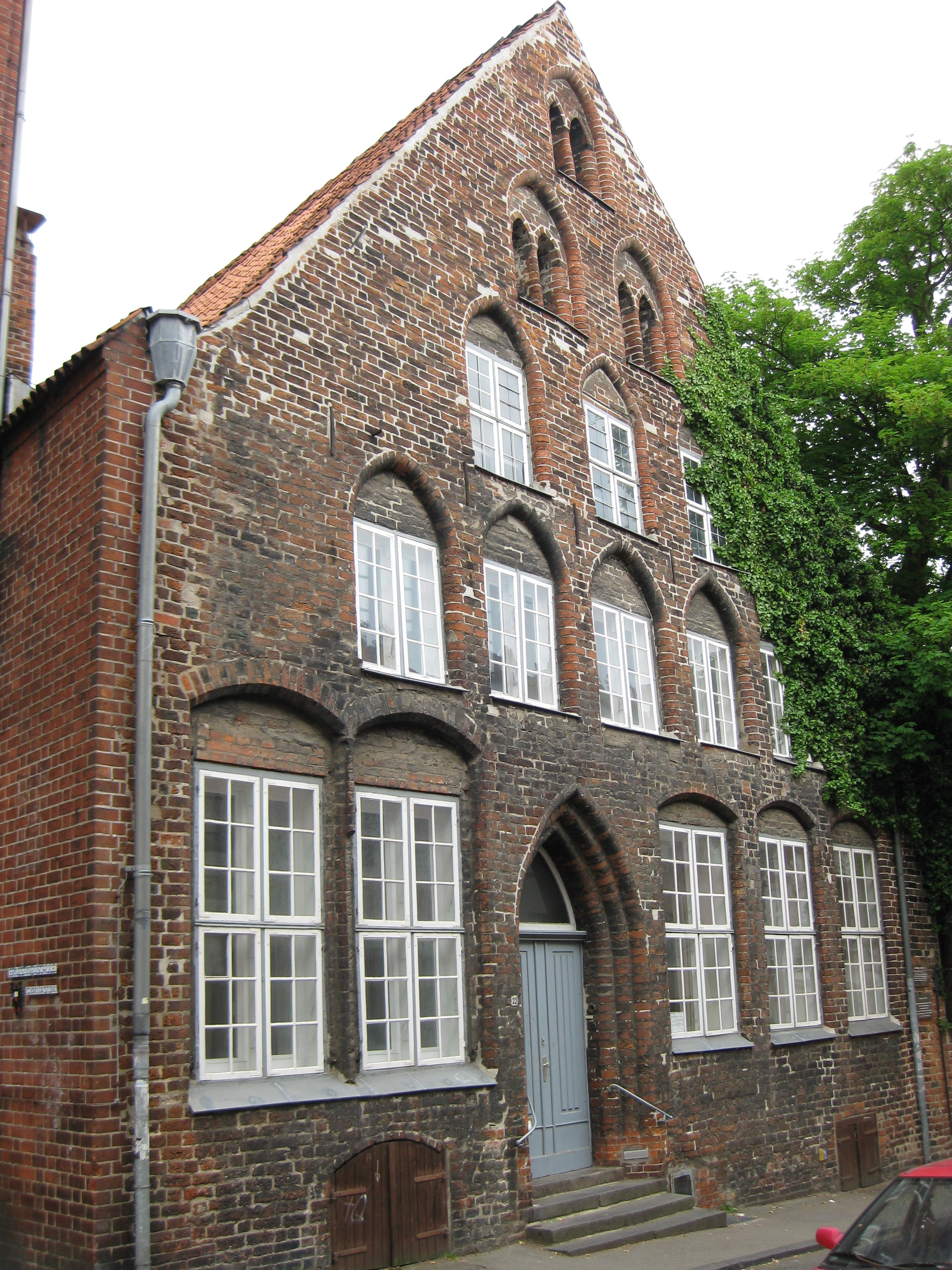 Das Gebäude des Kranen-Konvents in der Kleinen Burgstraße 22 der Lübecker Altstadt wurde zunächst als Beginenhaus 1282 errichtet. Es diente seither sozialen Zwecken, zumeist als Armen- oder Siechenhaus.